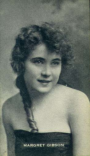 Margaret Gibson, aka Patricia Palmer